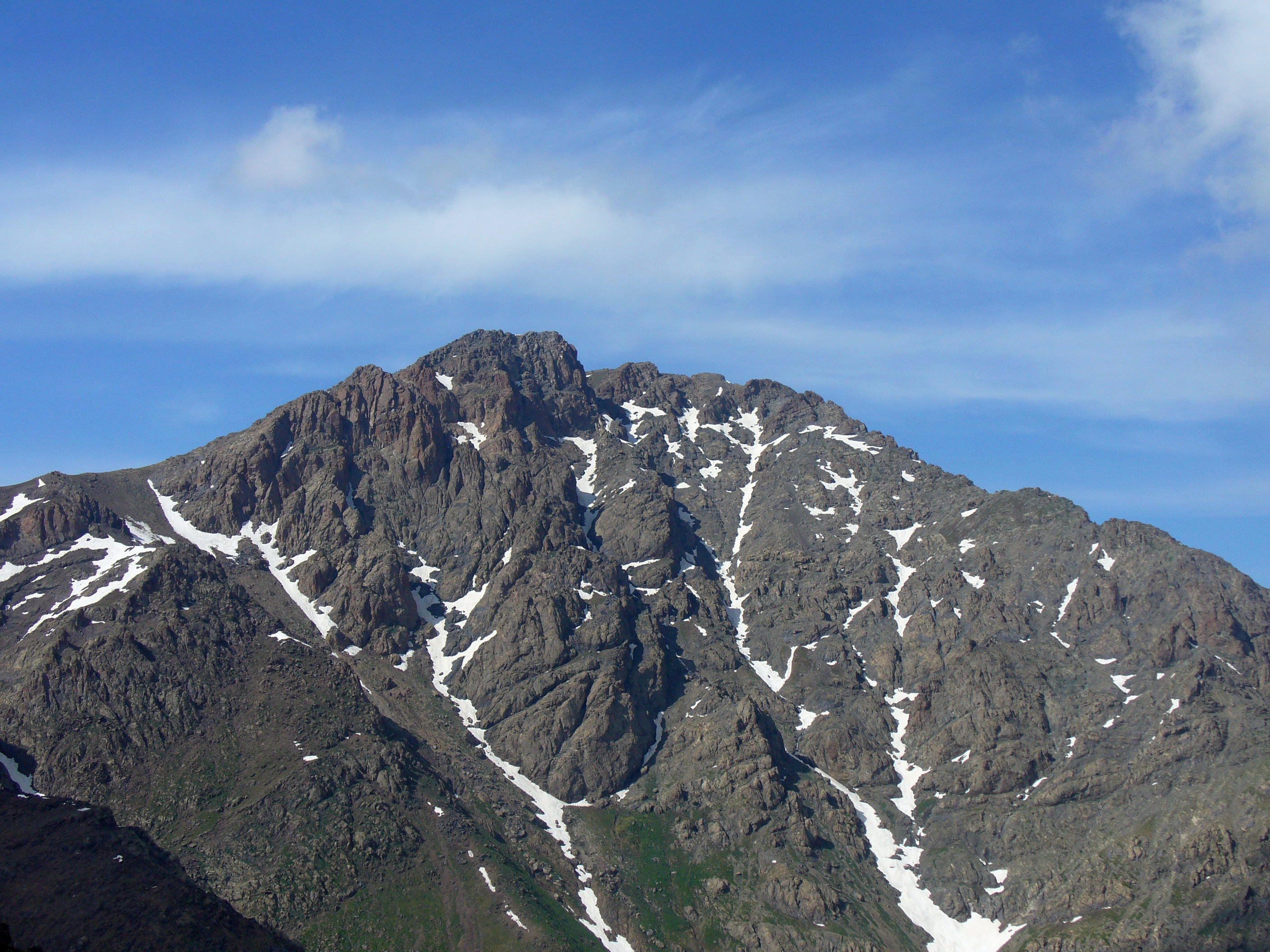 Вид на Мингбулак с юга. Бостанлыкский район, Ташкентская область, Республика Узбекистан.